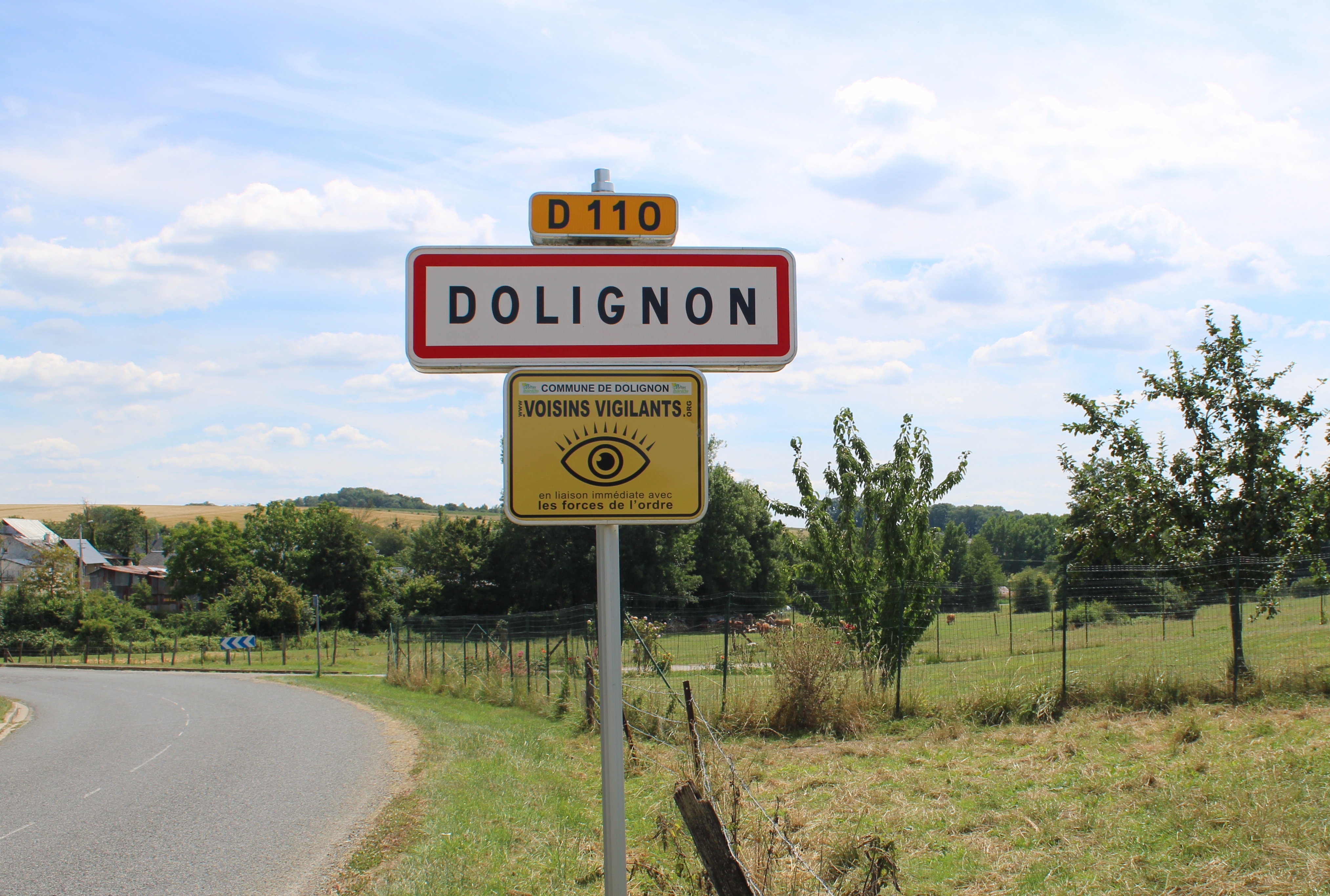 Entrée du village